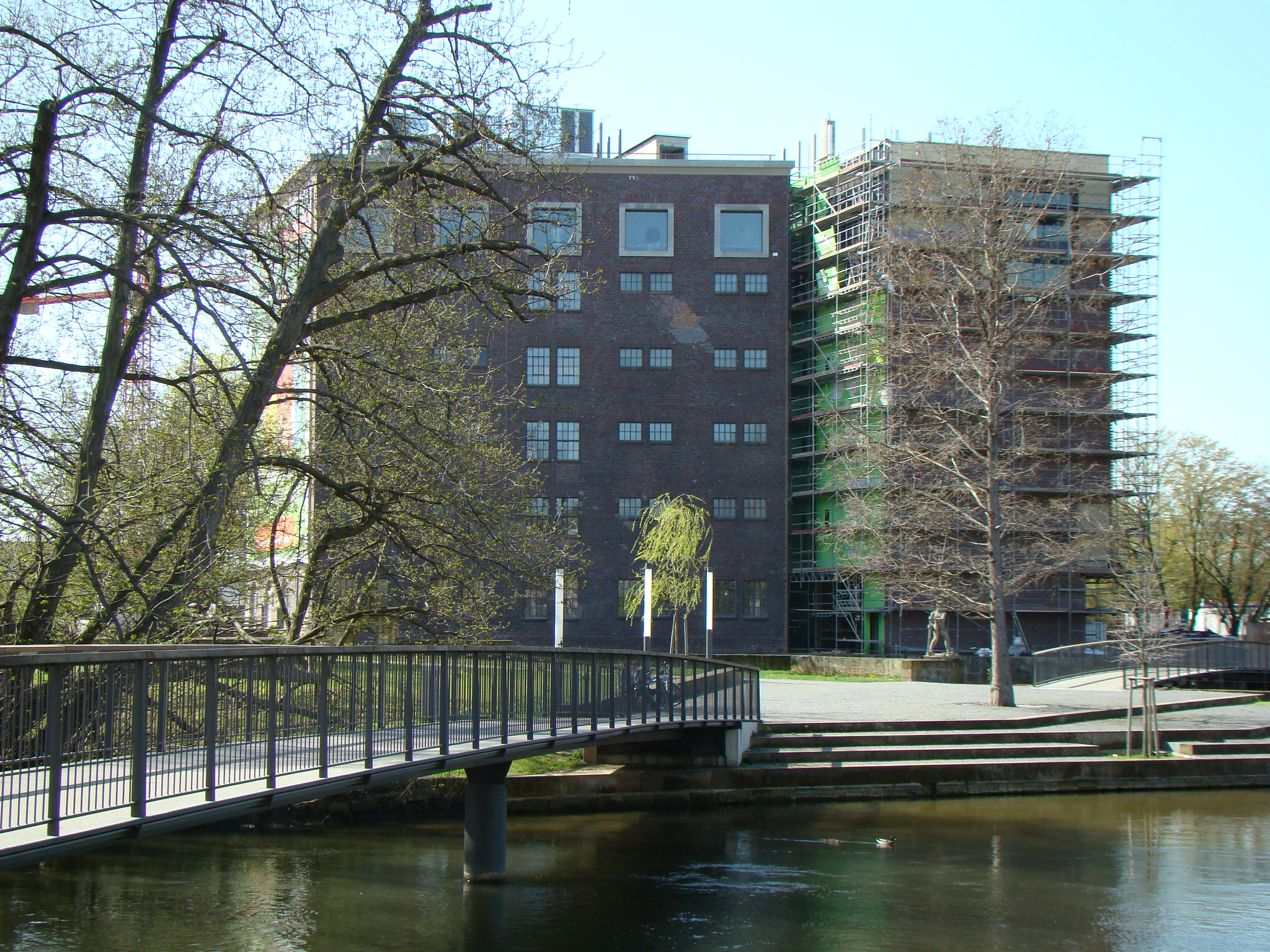 Hagenbucher in Heilbronn, Ansicht vom Hefenweiler